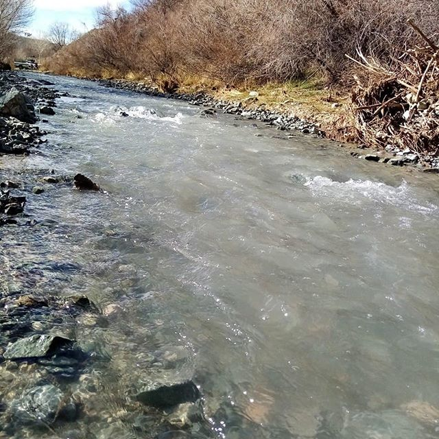 رودخانه بوکا در شهرستان بن استان چهارمحال و بختیاری جریان دارد.